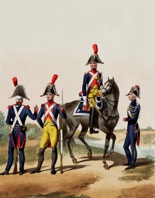 Gendarmerie impériale française à pied (à gauche) et à cheval (à droite).